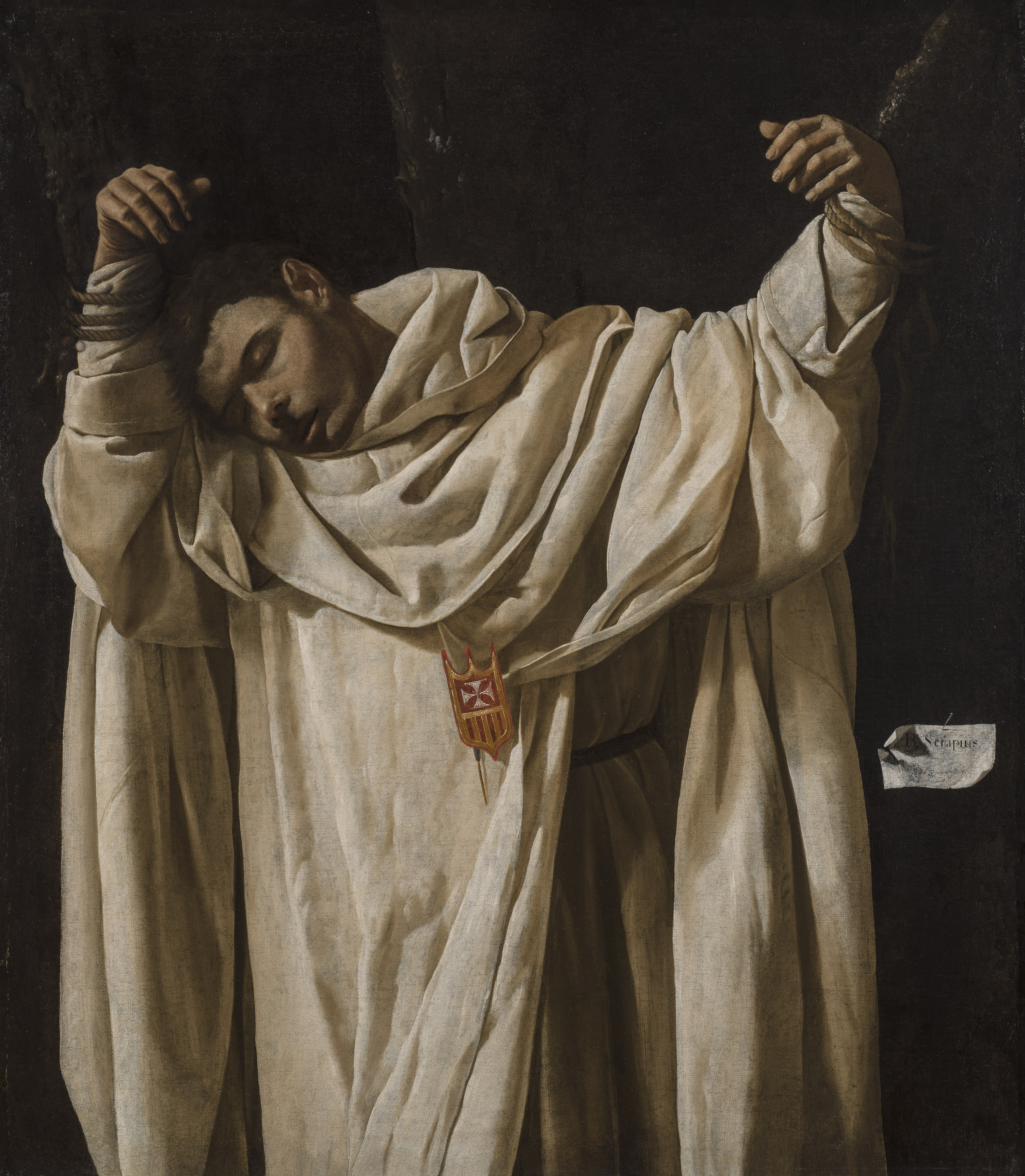 Gemäldezyklus »Szenen aus dem Leben des Hl. Pedro Nolasco«